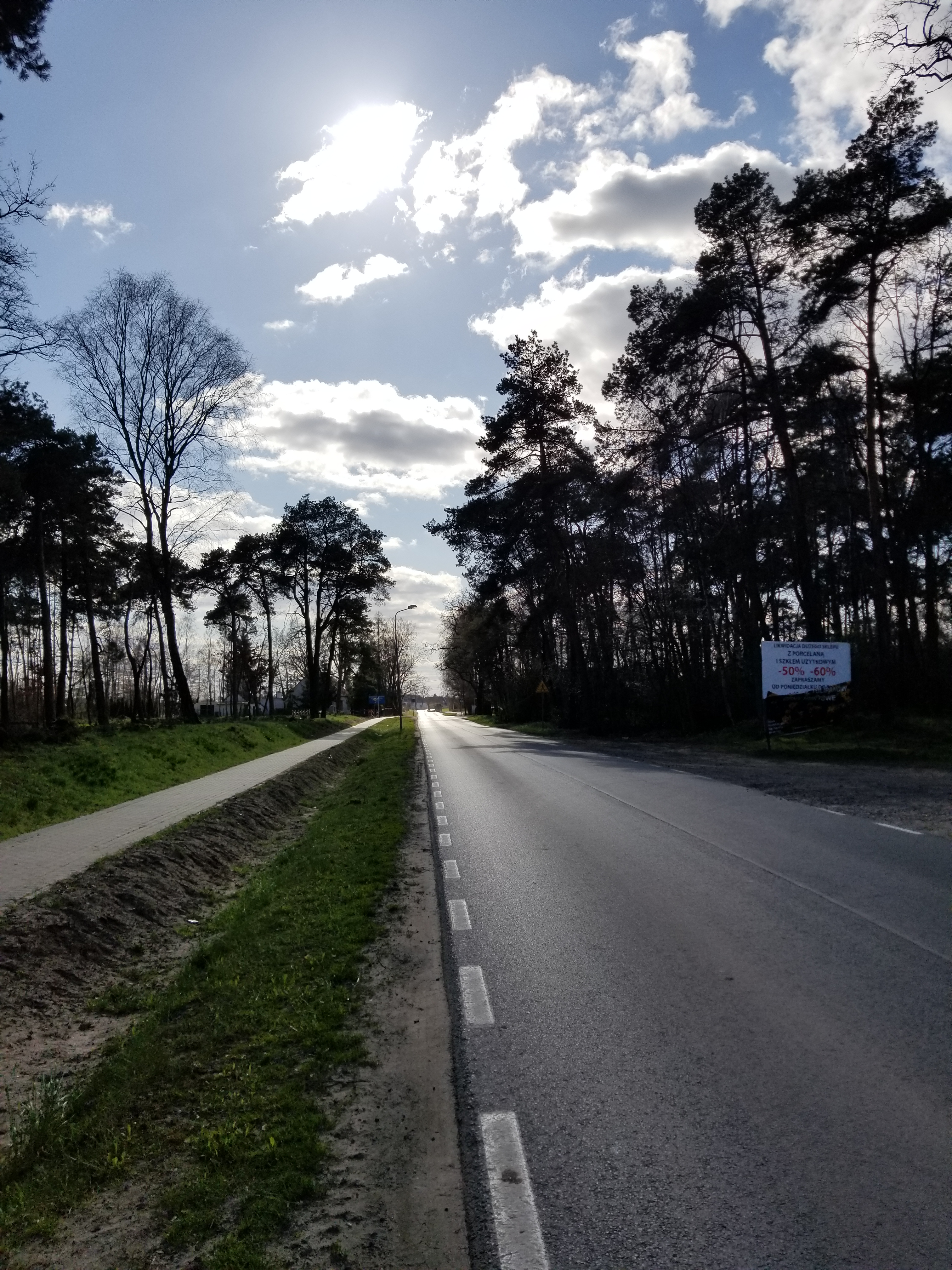 Główna ulica w Gołuskach